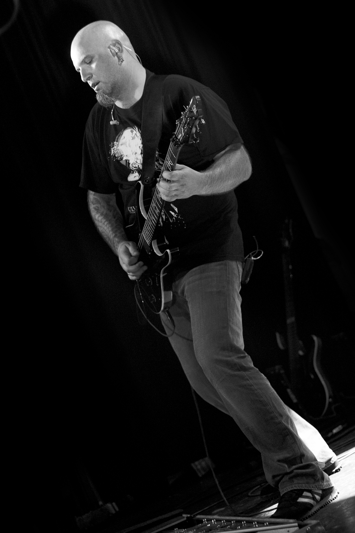 Piotr "Grudzień" Grudziński of Polish rock band Riverside